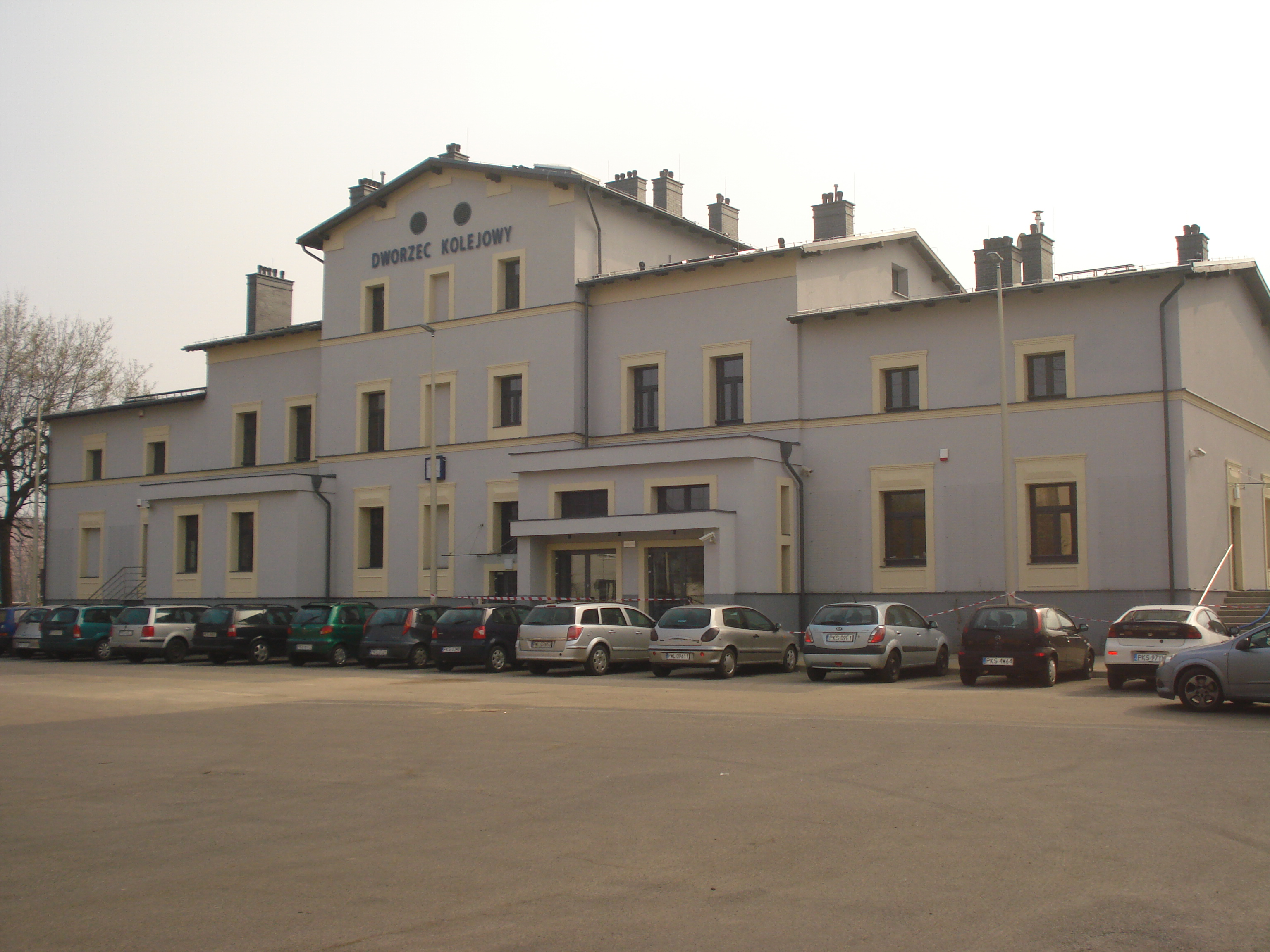 Dworzec PKP w Kościanie po remoncie